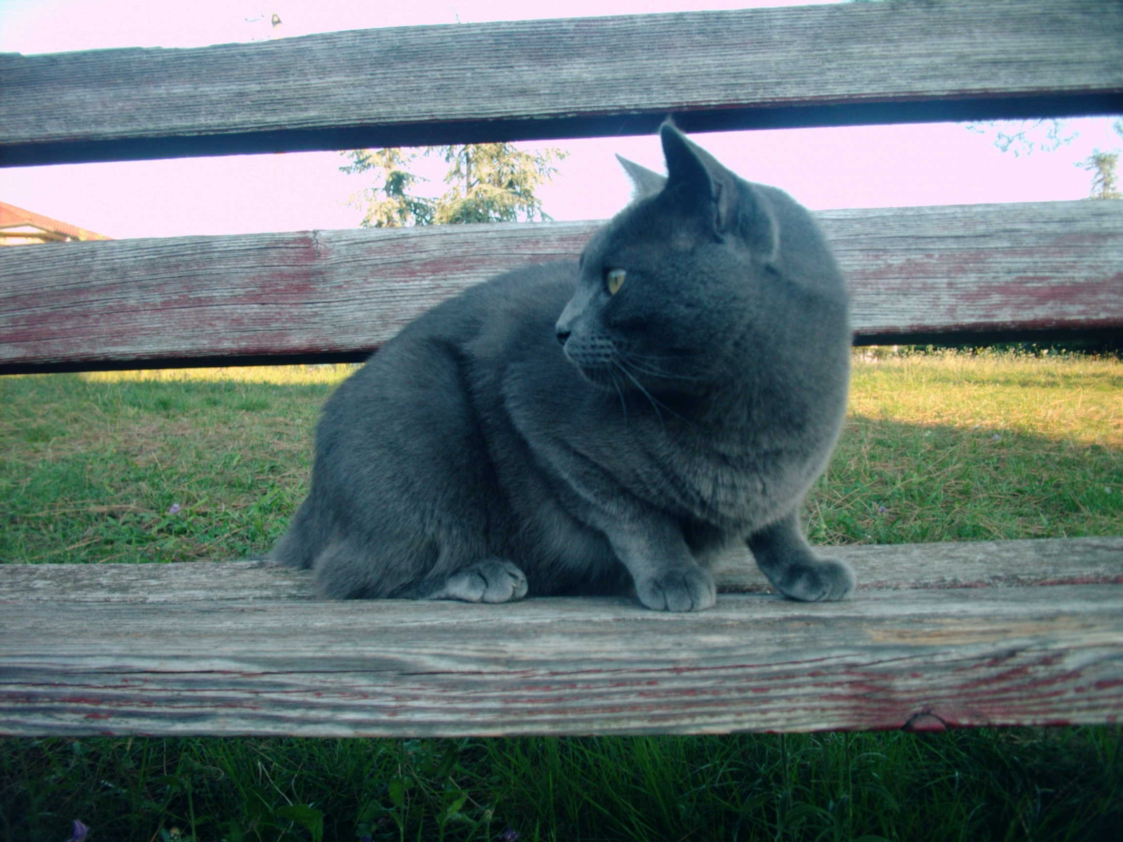 Шартрьоз.